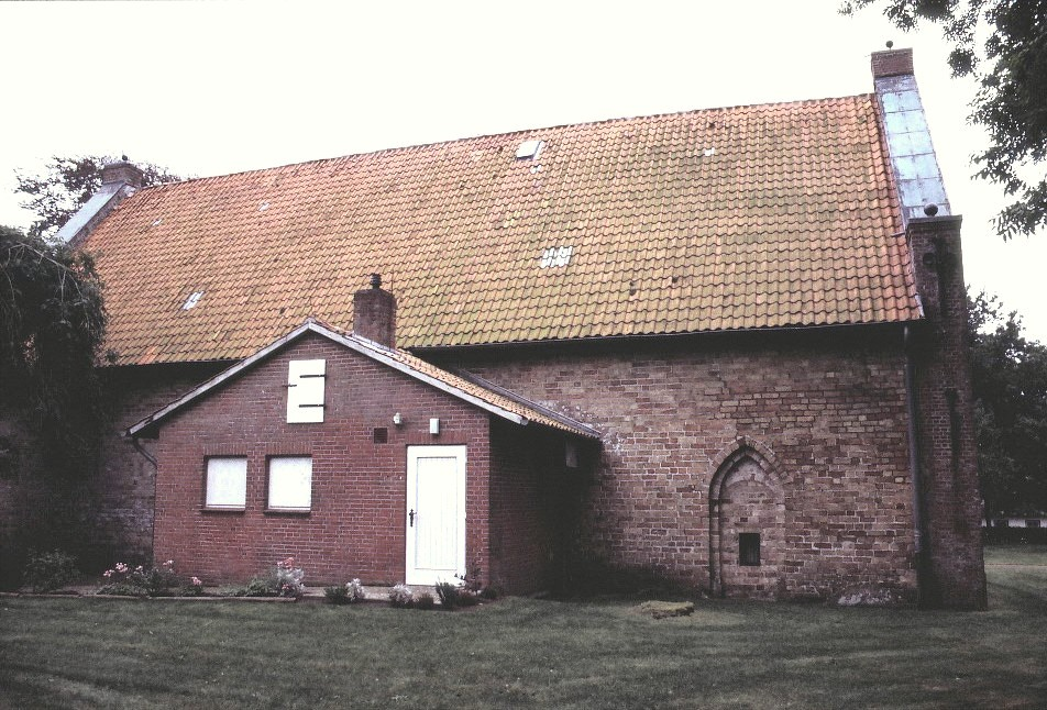 Enge Kirke i Sydslesvig. Enge kirke set fra nord